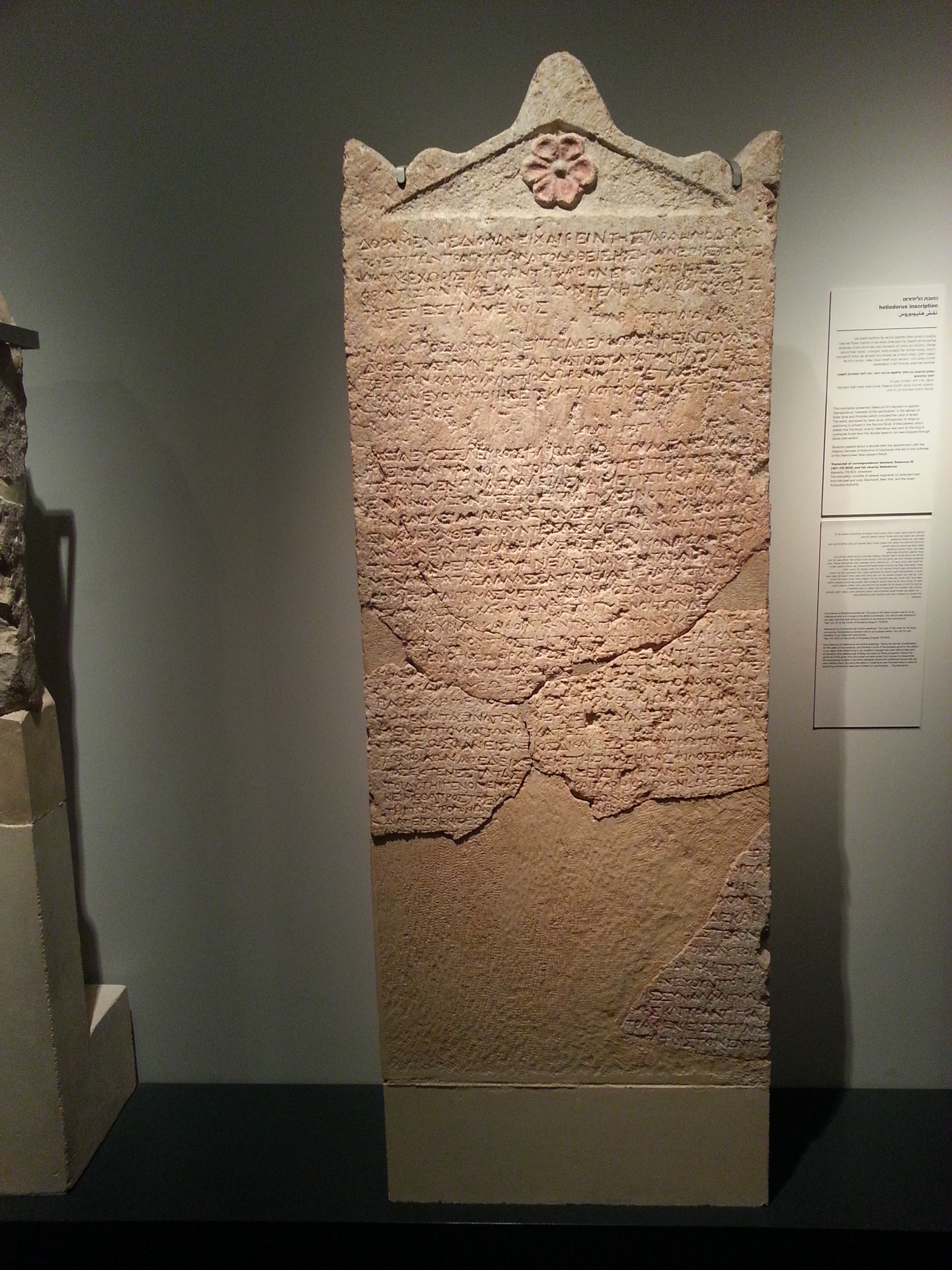 כתובת הליודורוס במוזיאון ישראל בירושלים